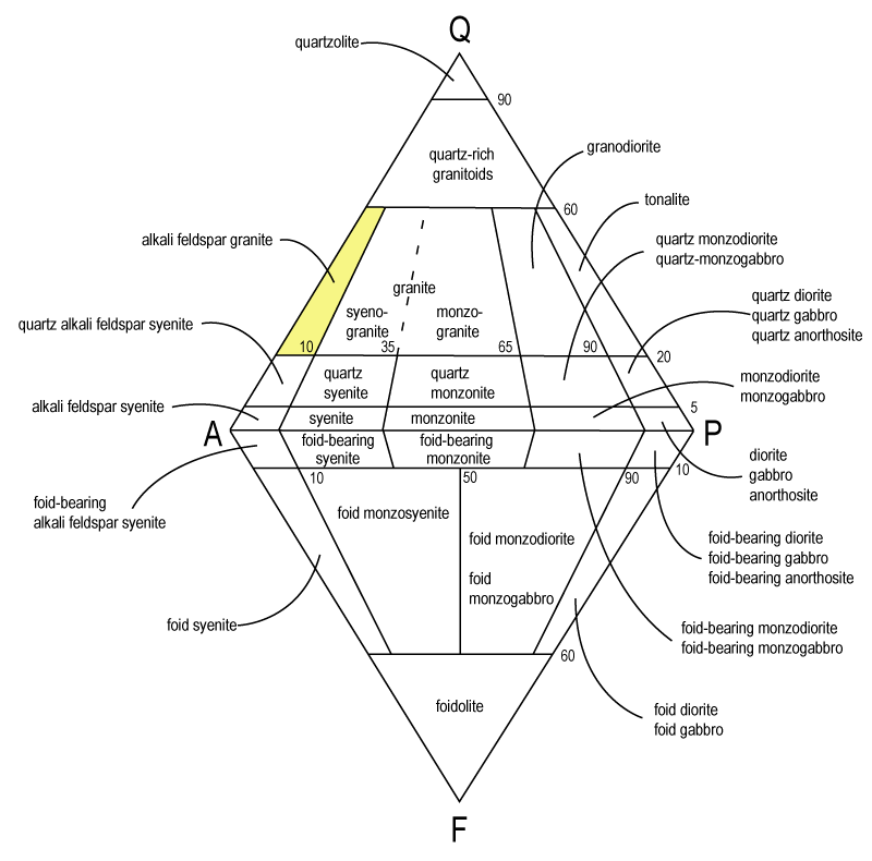 Leelispäevakivi-graniit QAPF-diagrammil